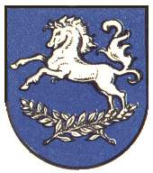 Wapen van Werkhoven.